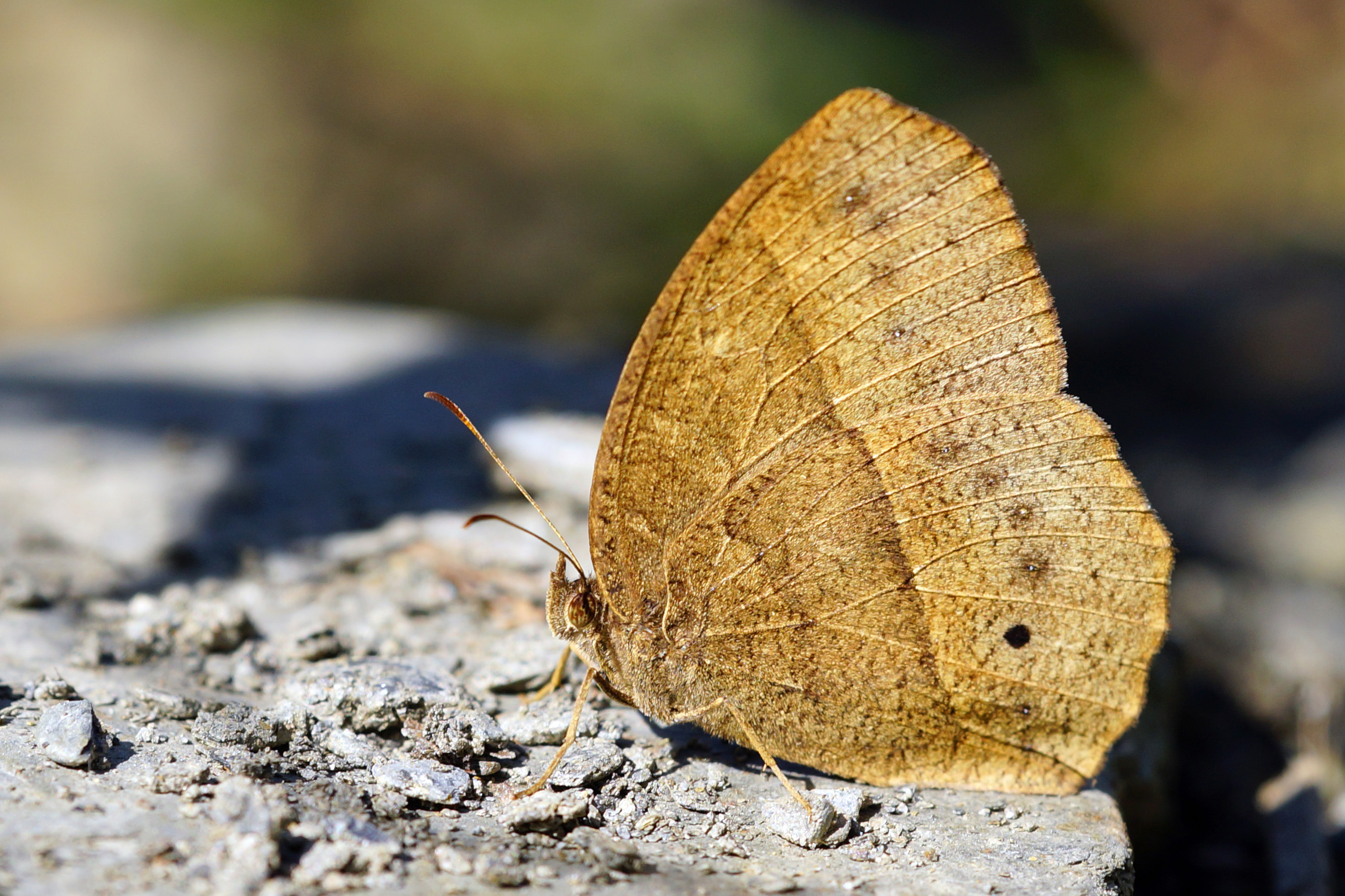 中文（台灣）: 切翅眉眼蝶 Mycalesis zonata